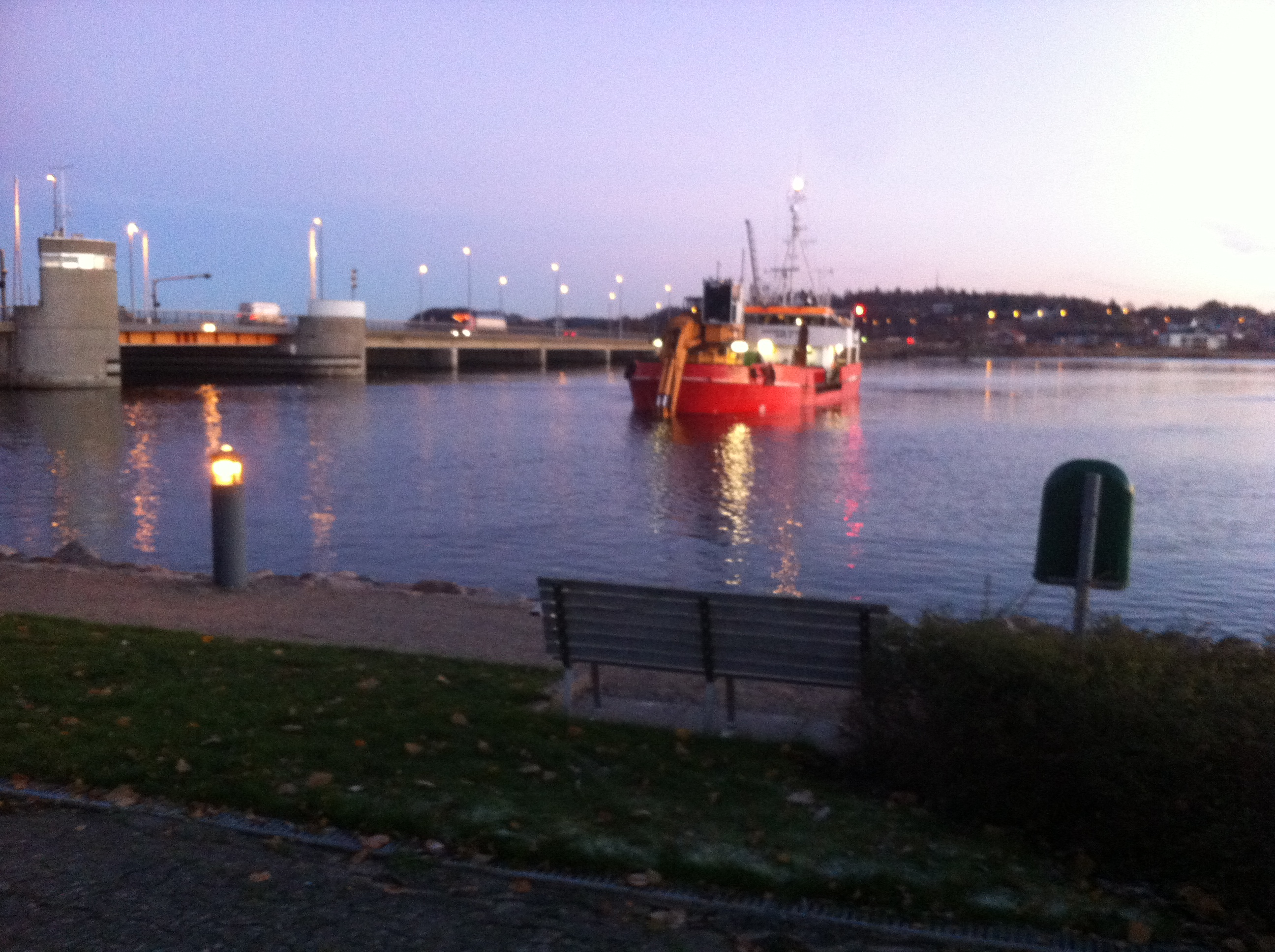 Skibet Margrethe Fighter på Mariager Fjord. Information about Margrethe Fighter may be found at IMO 8705620.A ship can change name and flag state through time, but the IMO number remains the same through the hull's entire lifetime. As a result, it can be useful to identify a ship by using the IMO number.